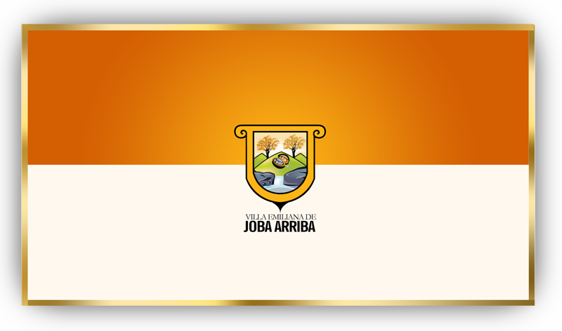 Bandera de la villa emiliana de Joba Arriba